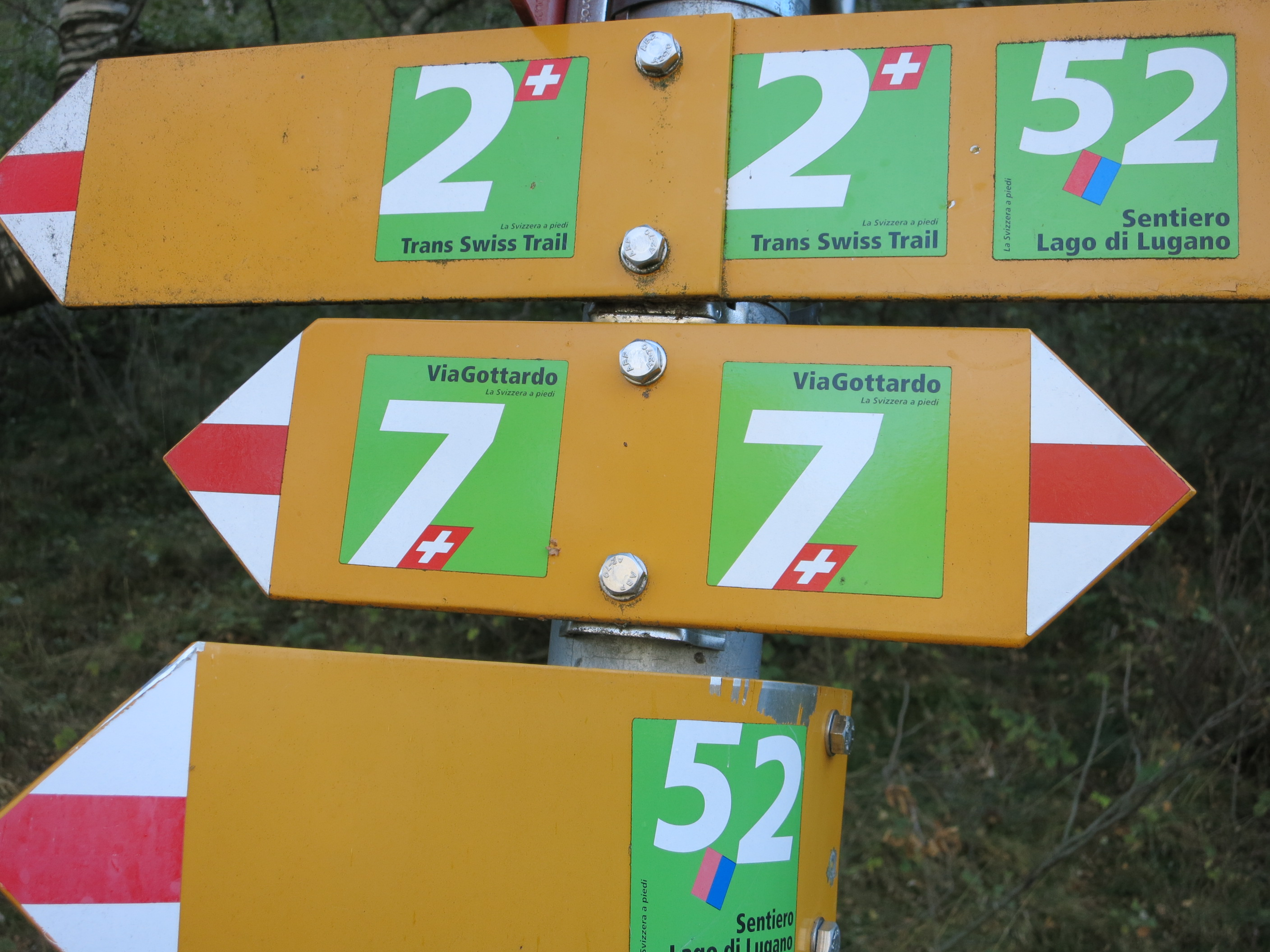 Gola di Lago TI, Schweiz